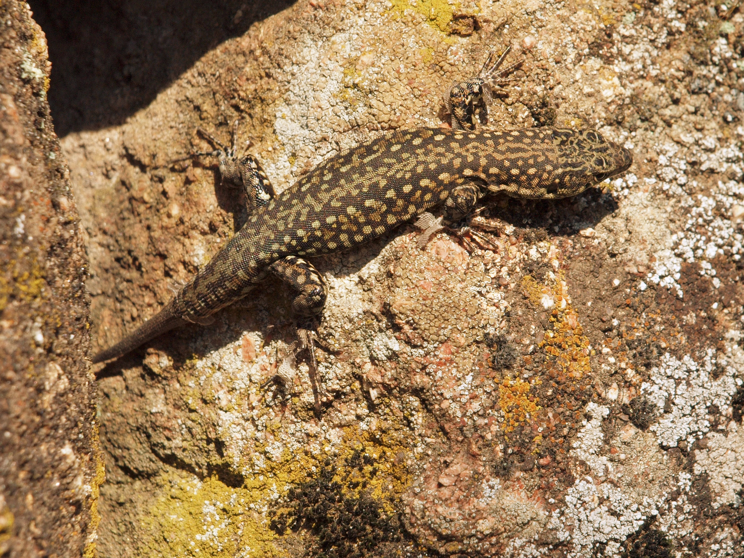 Podarcis hispanica, macho. Losar de la Vera (Cáceres, España).